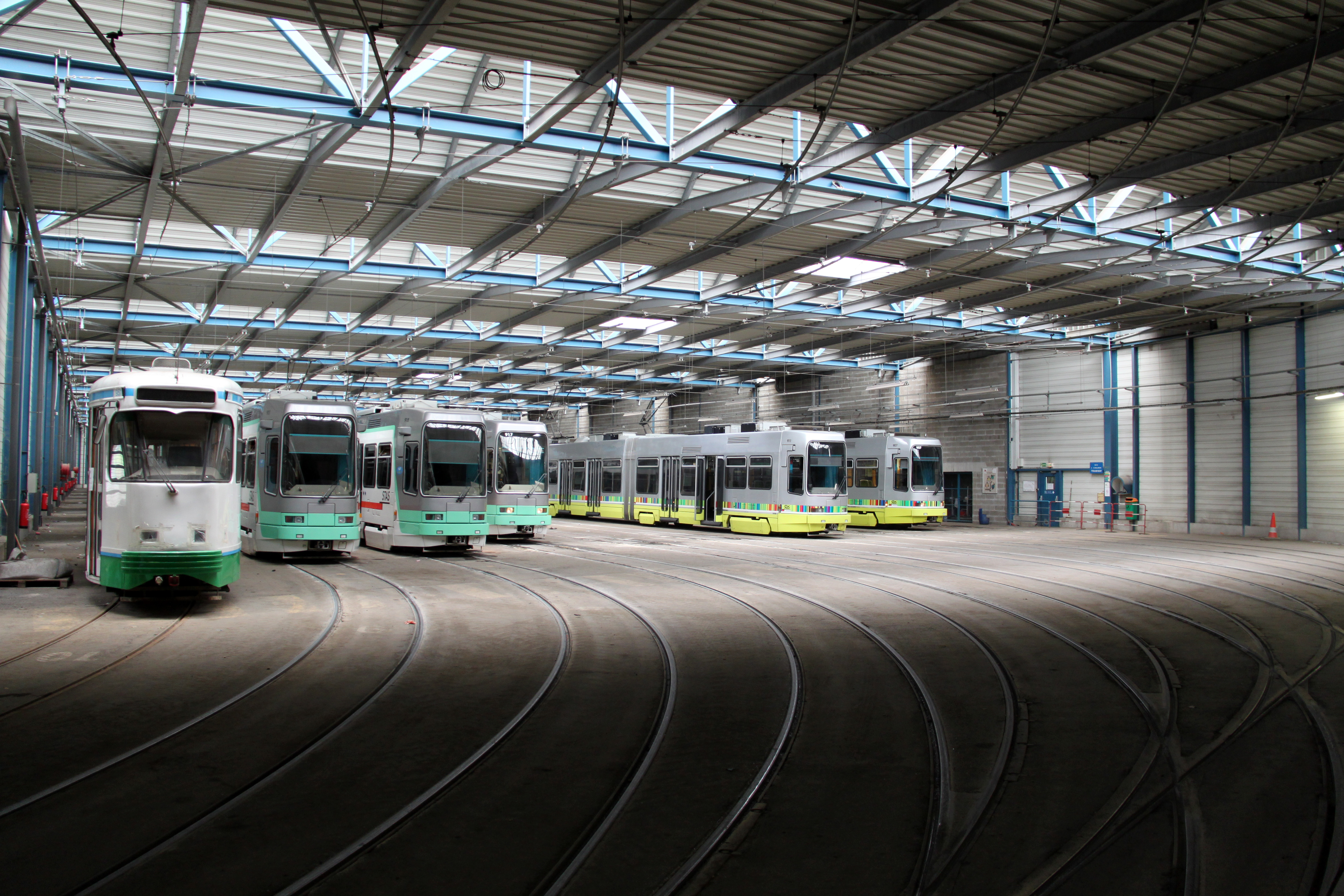 Trams van de STAS in het tramdepot van Saint-Étienne. Links op de foto een rij PCC-trams, die daar al jaren tevergeefs op kopers wachten.